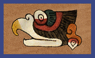 Symbole Cozcacuauhtli du Codex Borgia (fac-similé). Foundation for the Advancement of Mesoamercan Studies, Inc. (FAMSI).